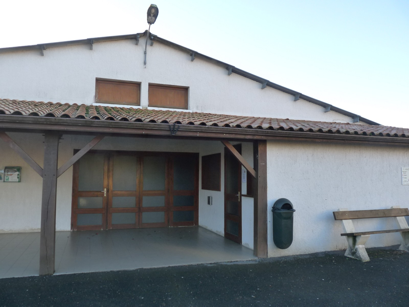 Salle des fêtes, Coux, Charente-Maritime, France